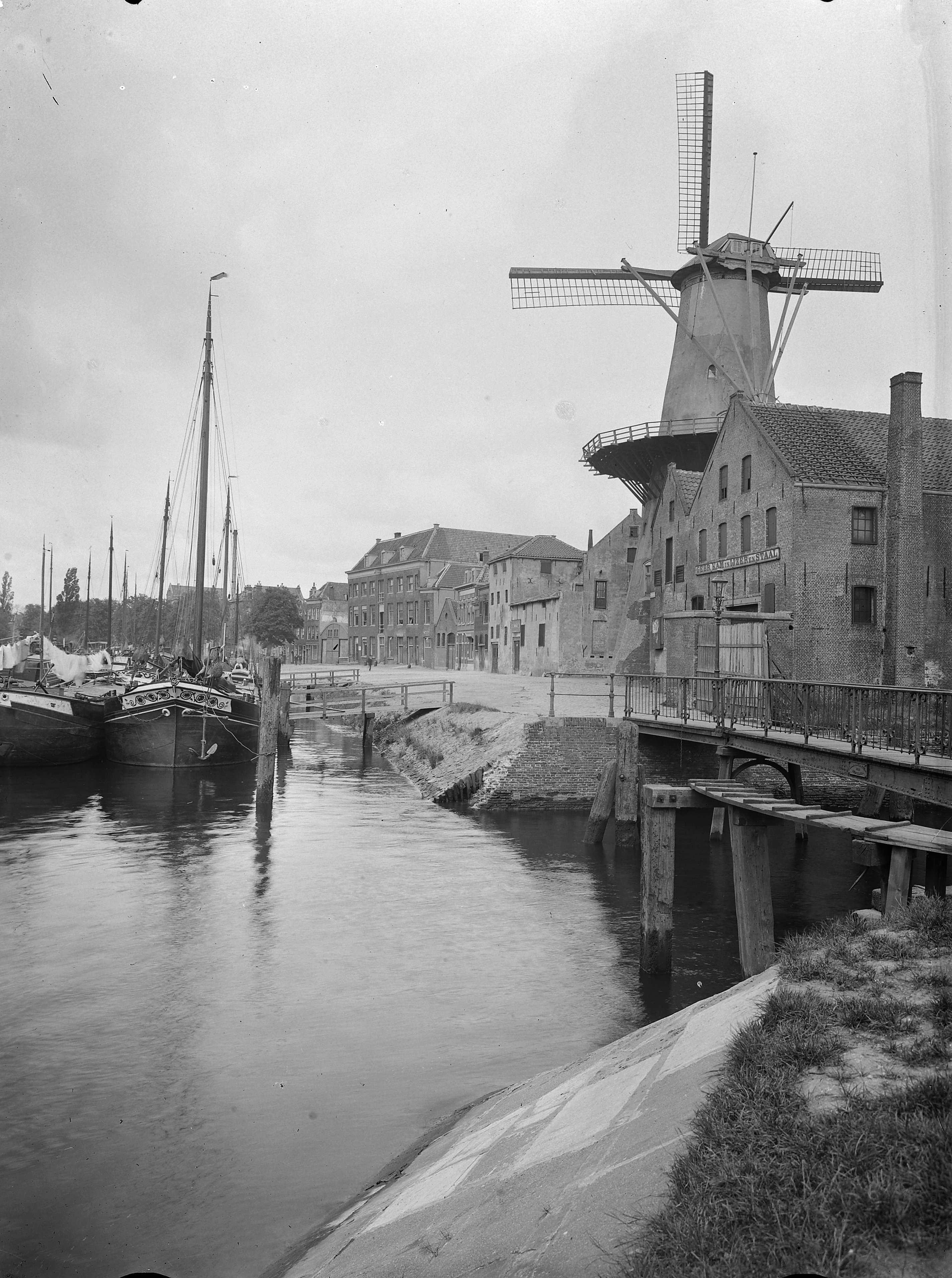 De Distilleerketel/ Voormalig depot van de VOC: Gezicht op de haven met ronde stenen stellingmolen en voormalig depot van de VOC (opmerking: In: Buiten ; 12(1918), nr. 26, p. 301)